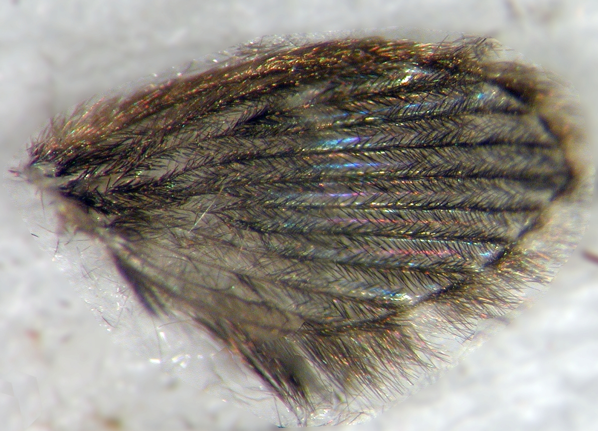 Psychodidae spec, Schwanheimer Düne, Frankfurt am Main, Hessen, Deutschland